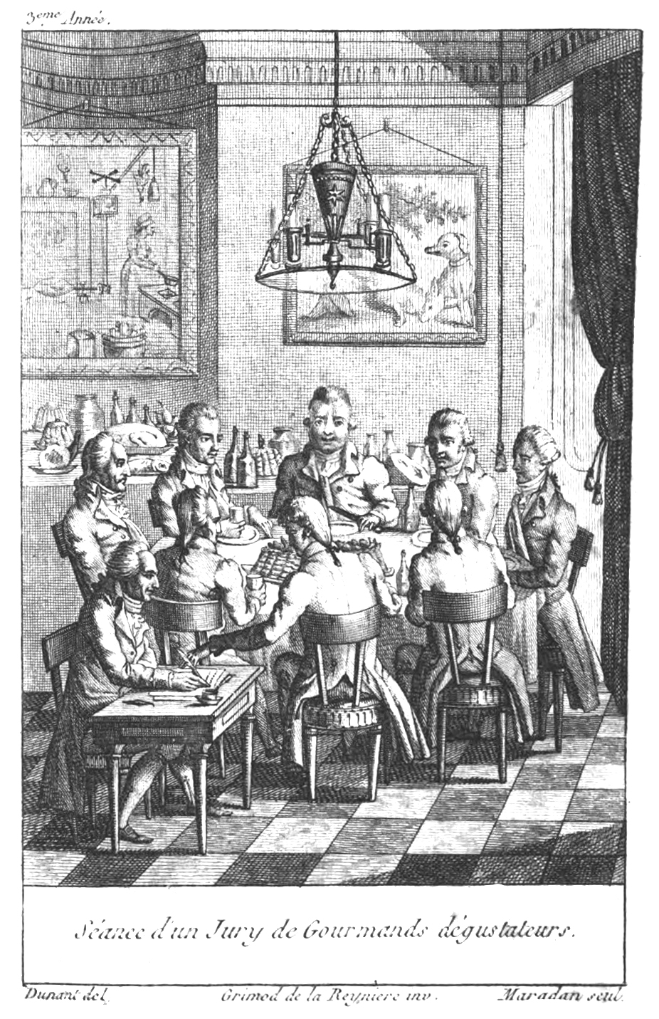 Feinschmeckerjury